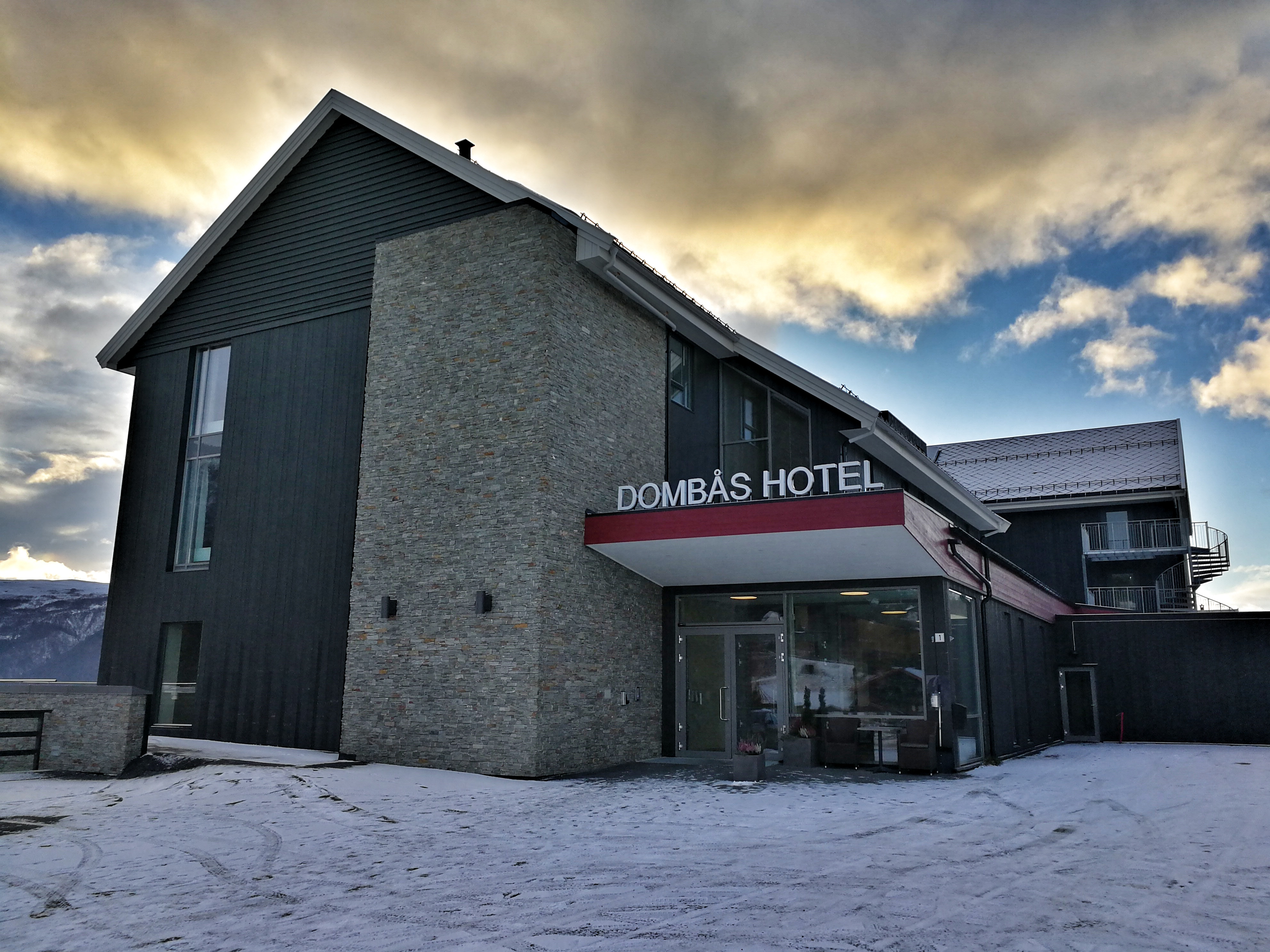 Foto: Sjur-Magnus Aaboen